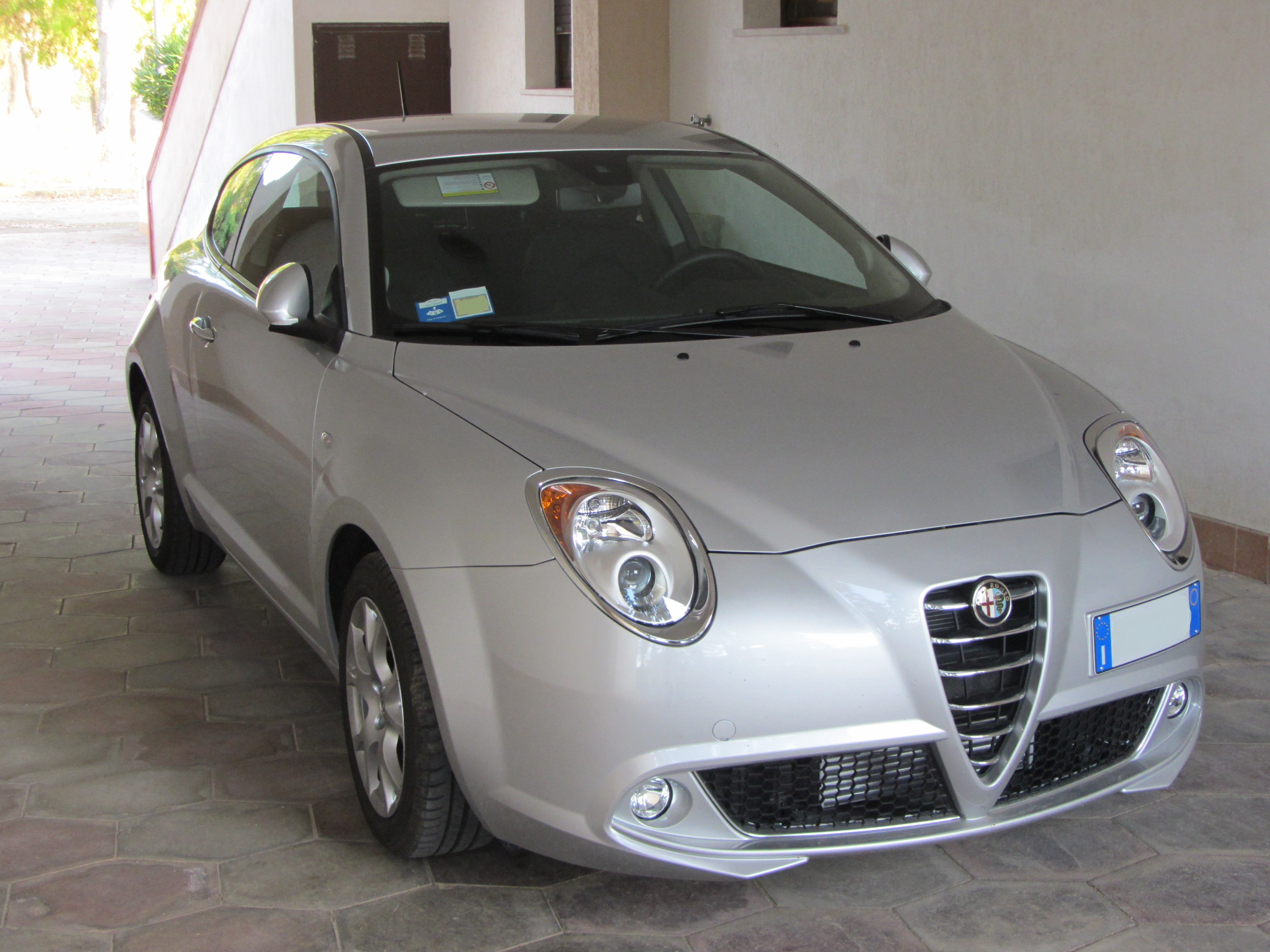 Un'Alfa Romeo Mito grigia utilizzata durante una vacanza nel Salento ( Auto noleggio Maggiore )